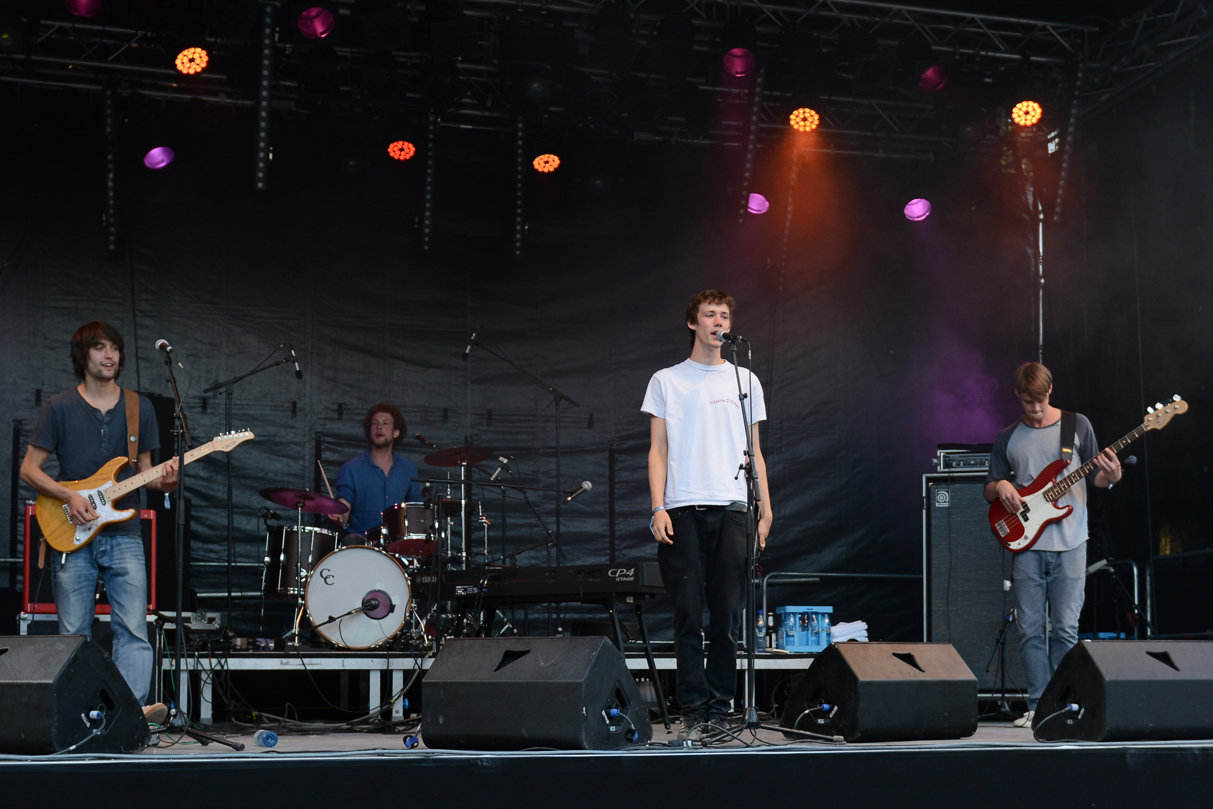 AnnenMayKantereit beim Traumzeit-Festival 2014